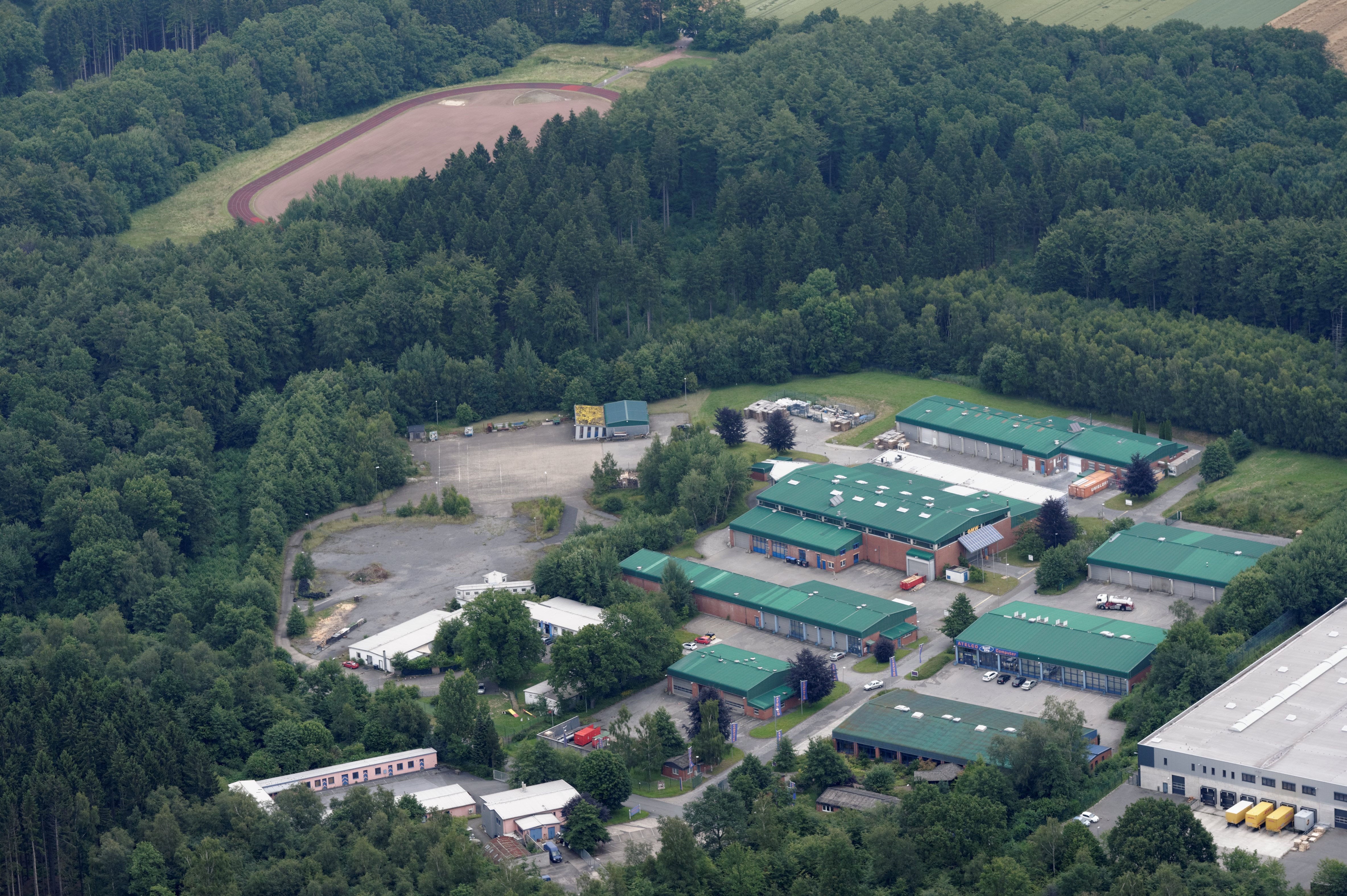 Fotoflug Sauerland Nord. Möhnesee Gewerbepark Möhnesee mit Atelco, auf ehemaligem britischen Kasernengelände The making of this document was supported by the Community-Budget of Wikimedia Germany.